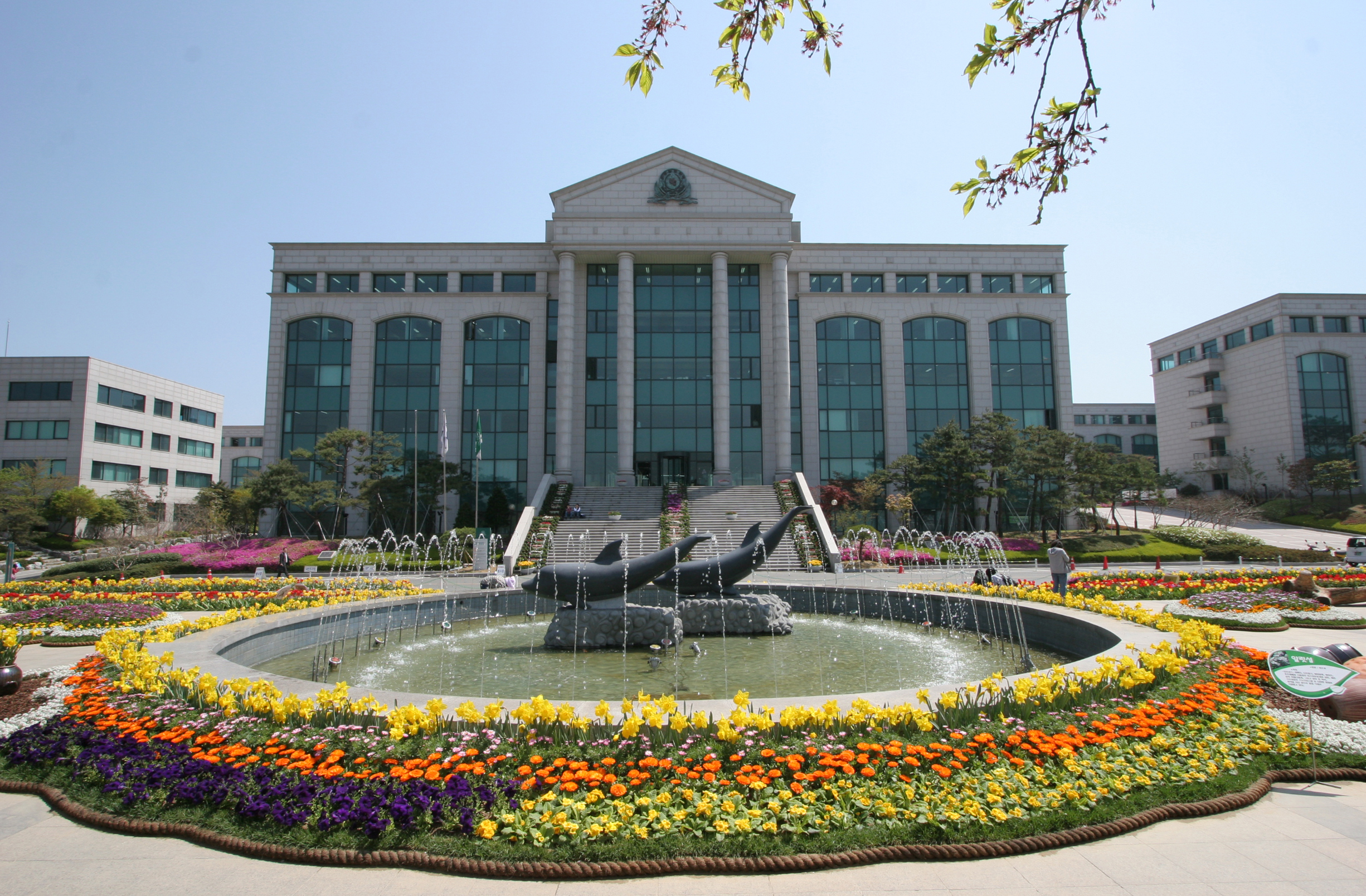 울산과학대학교-본관